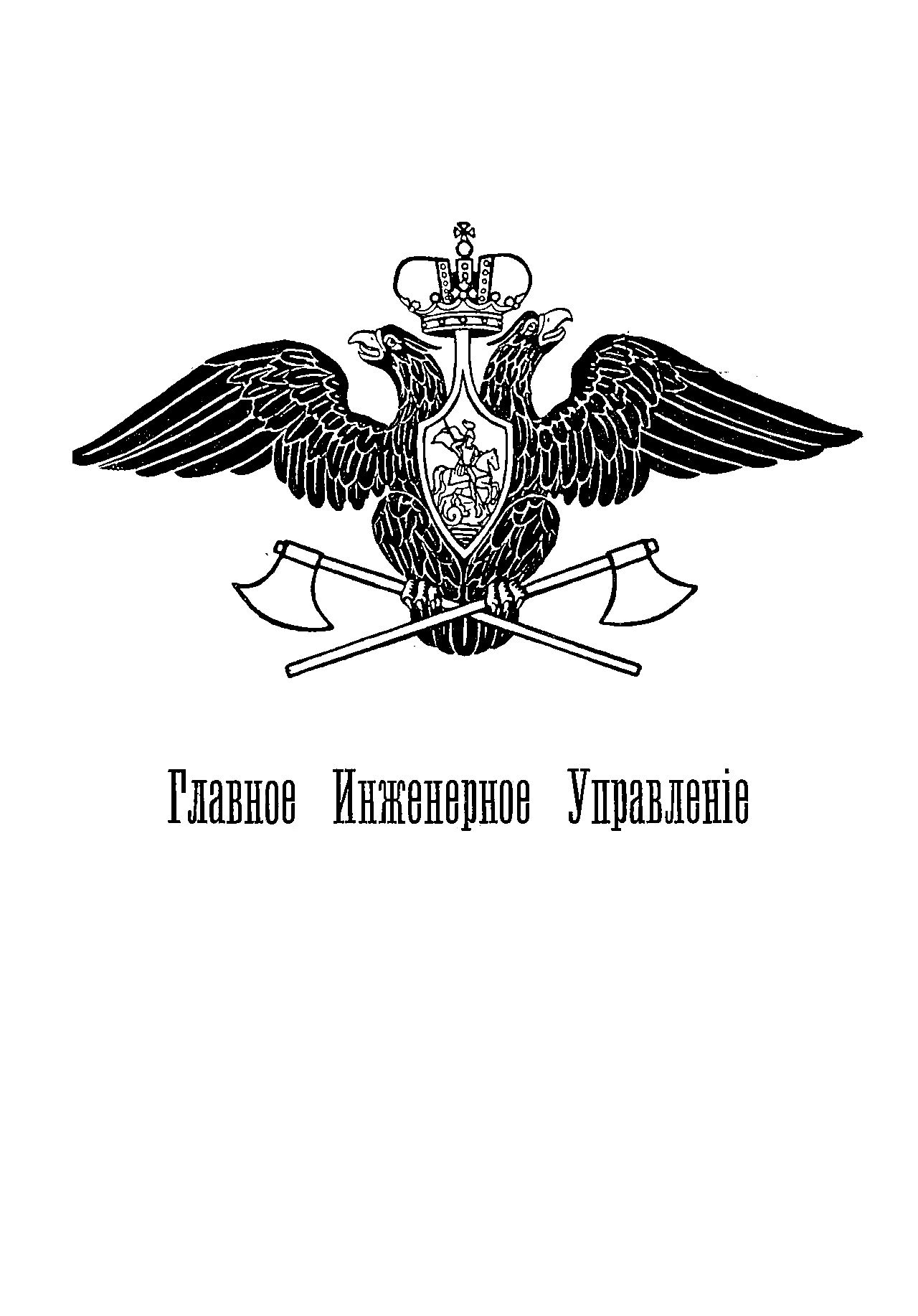 Возможный герб ГИУ